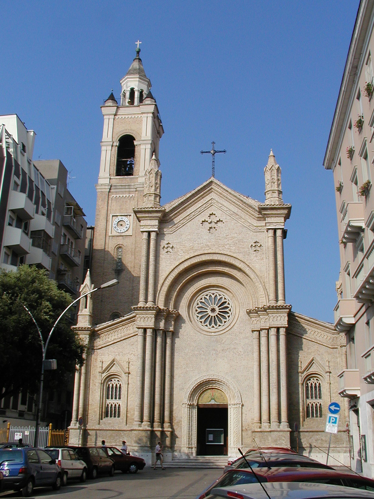 Eine Kirche in Pescara.